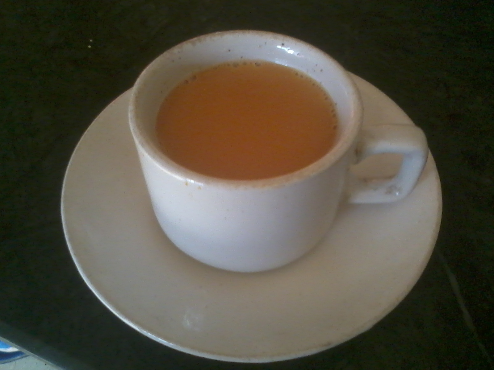 Irani Chai